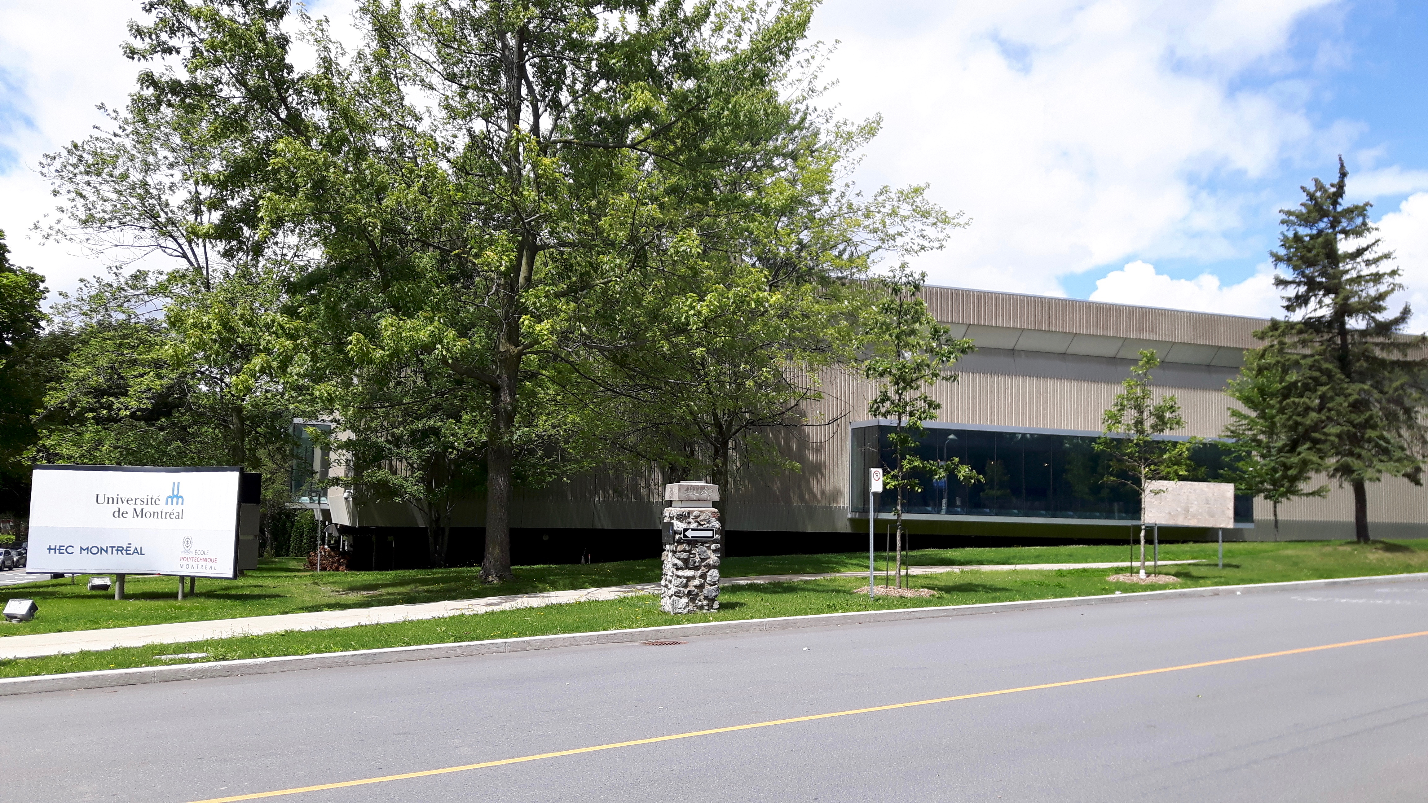 Pavillon Decelles, Université de Montréal.